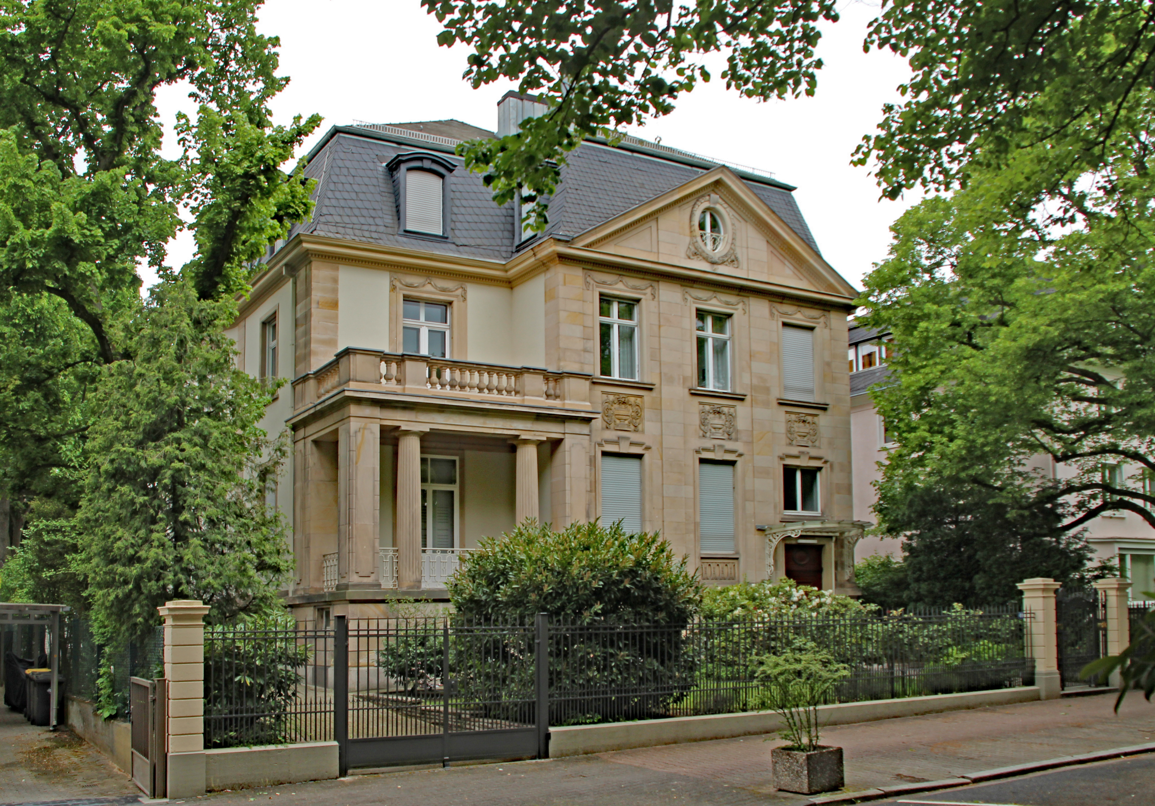 Bildinhalt: Villa Wertheimer, Zeppelinallee 69. Vormals Villa Rohmer, Bauherr Wilhelm Rohmer (* 13.02.1859 Frankfurt; † 28.02.1912 Meran) Aufnahmeort: Frankfurt am Main, Deutschland